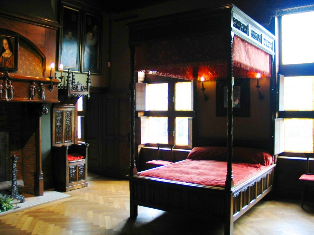 Chambre avec lit à baldaquin et, à côté de la porte, un faudesteuil (dit aussi chaire, Kasteel van Gaasbeek, Belgique)